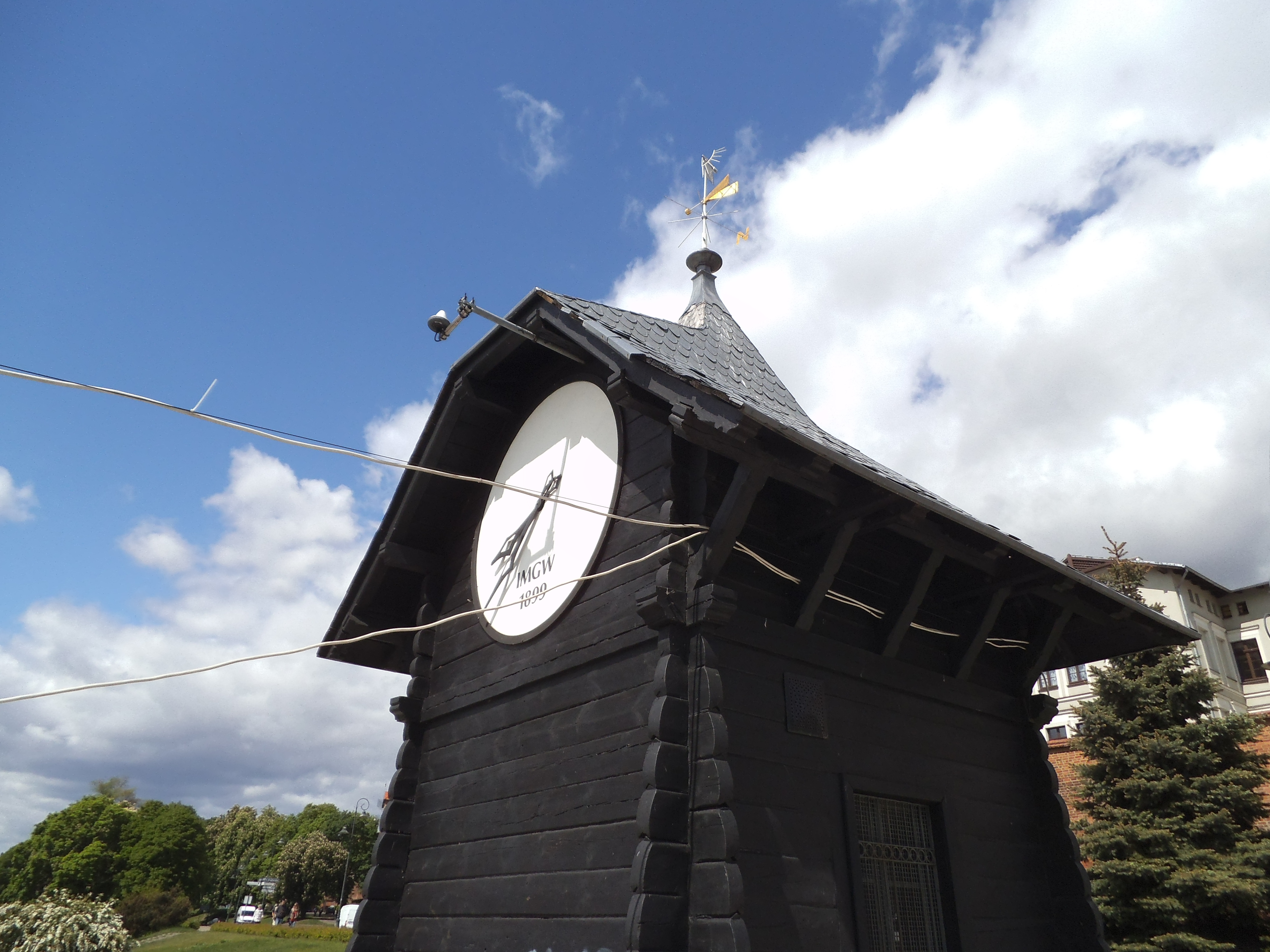 Stacja Pomiarowa w Toruniu